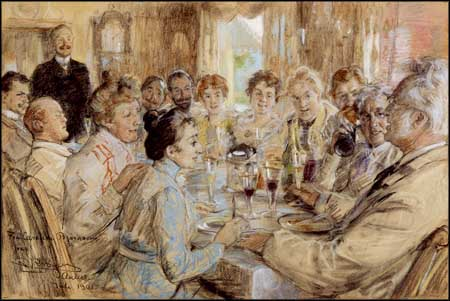 Middagsbordet på Aulestad tegnet av P.S. Krøyer i 1901. Bjørnstjerne Bjørnson lengst til høyre.